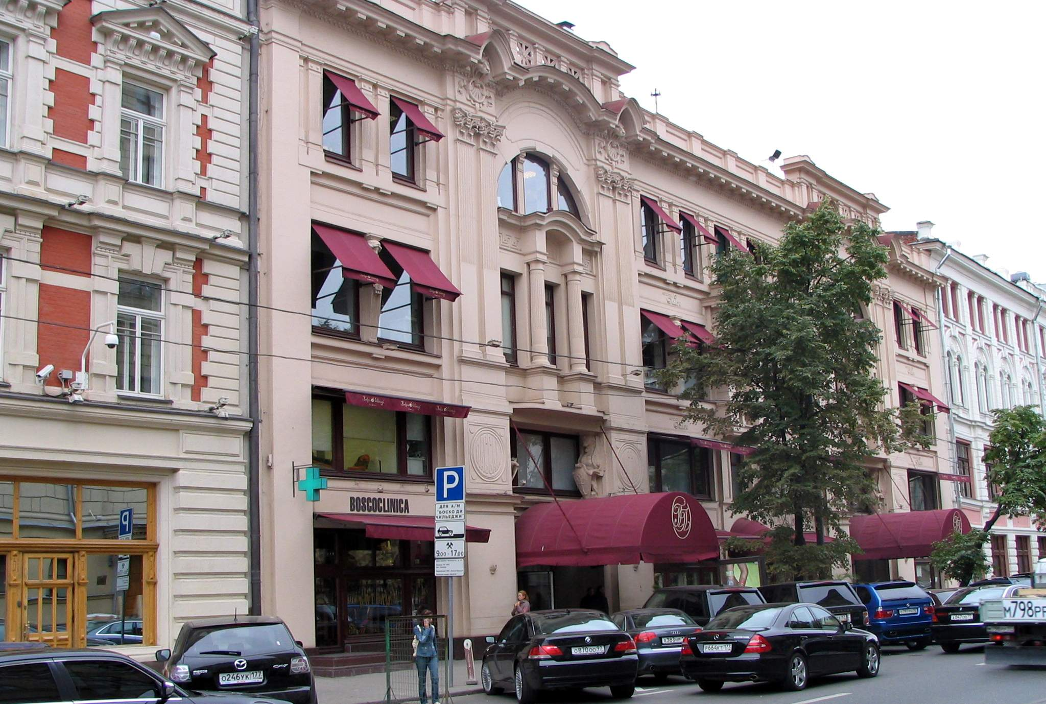 Moscow. Neglinnaya str_13.Petrovsky_passazh Moscow. Neglinnaya str_13.Petrovsky_passazh